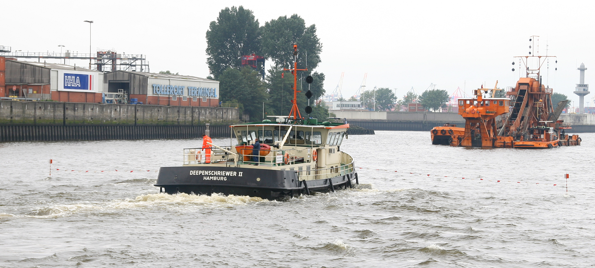 Peilschiff "Deepenschriewer II" im Hamburger Hafen, im Hintergrund das Baggerschiff "Odin" Deepenschriewer II Bauwerft: Ernst Menzer, Hamburg Bergedorf, Baujahr 1970 Länge über alles 27,50 m Breite über alles 8,60 m Tiefgang bei Messfahrt 1,35 m Wasserverdrängung 94,5 m³ Geschwindigkeit (Freifahrt) 7,0 kn Geschwindigkeit (Messfahrt) 4,0 kn Messbreite bei ausgeklappten Messauslegern 39,00m mit 38 Echolotschwingern Antriebsleistung 2 x 147 kw / 200 PS Antrieb über 2 Voith-Schneider-Propeller 10 E / 65